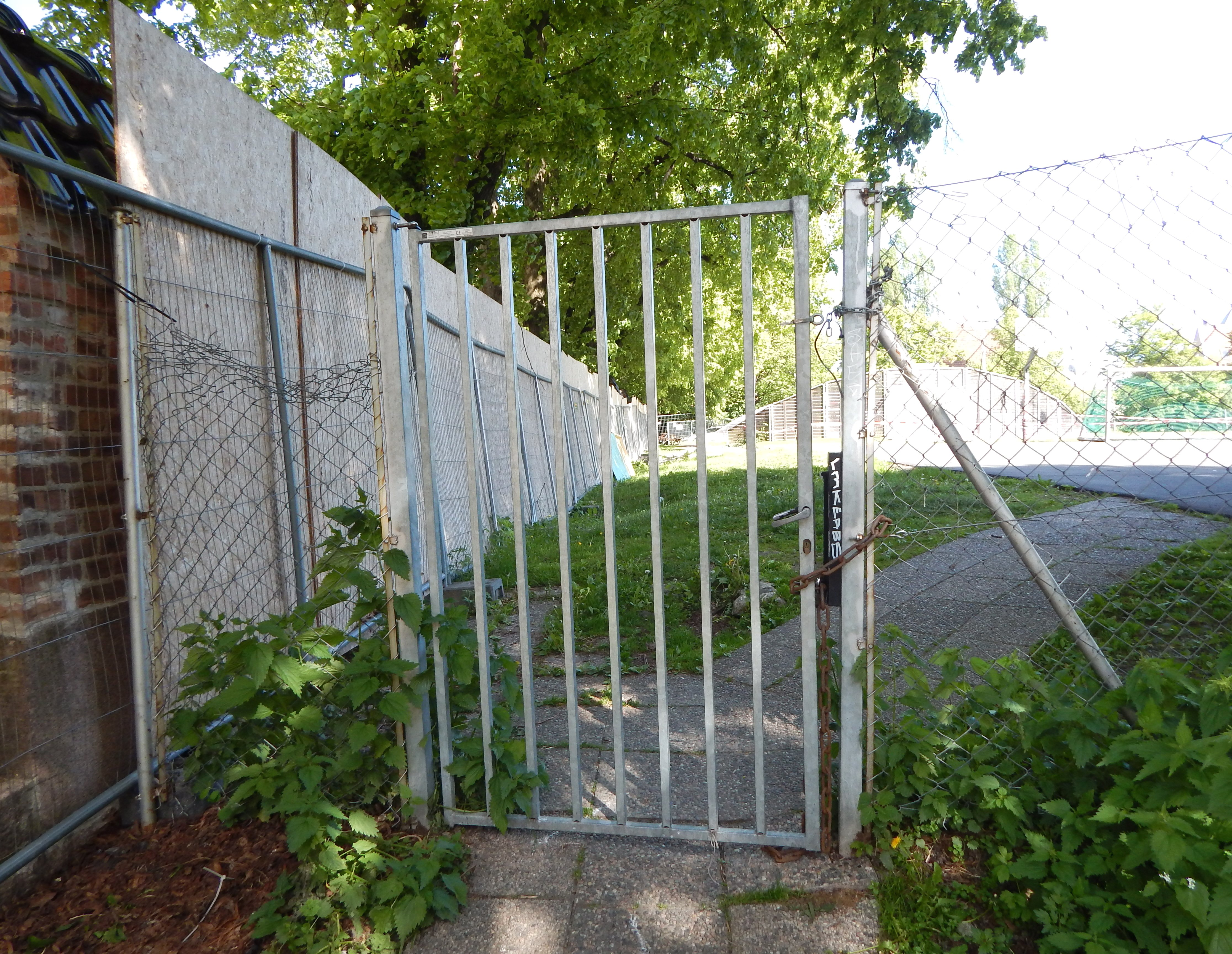 Her gikk en gang Oluf Ryghs gate.